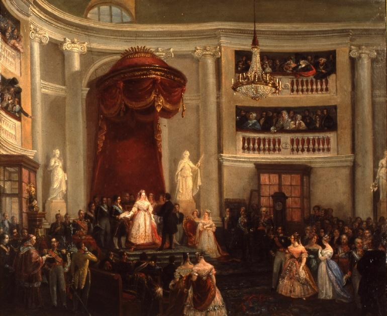 La obra representa a la reina Isabel II de España (1830-1904), jurando la Constitución de 1837.